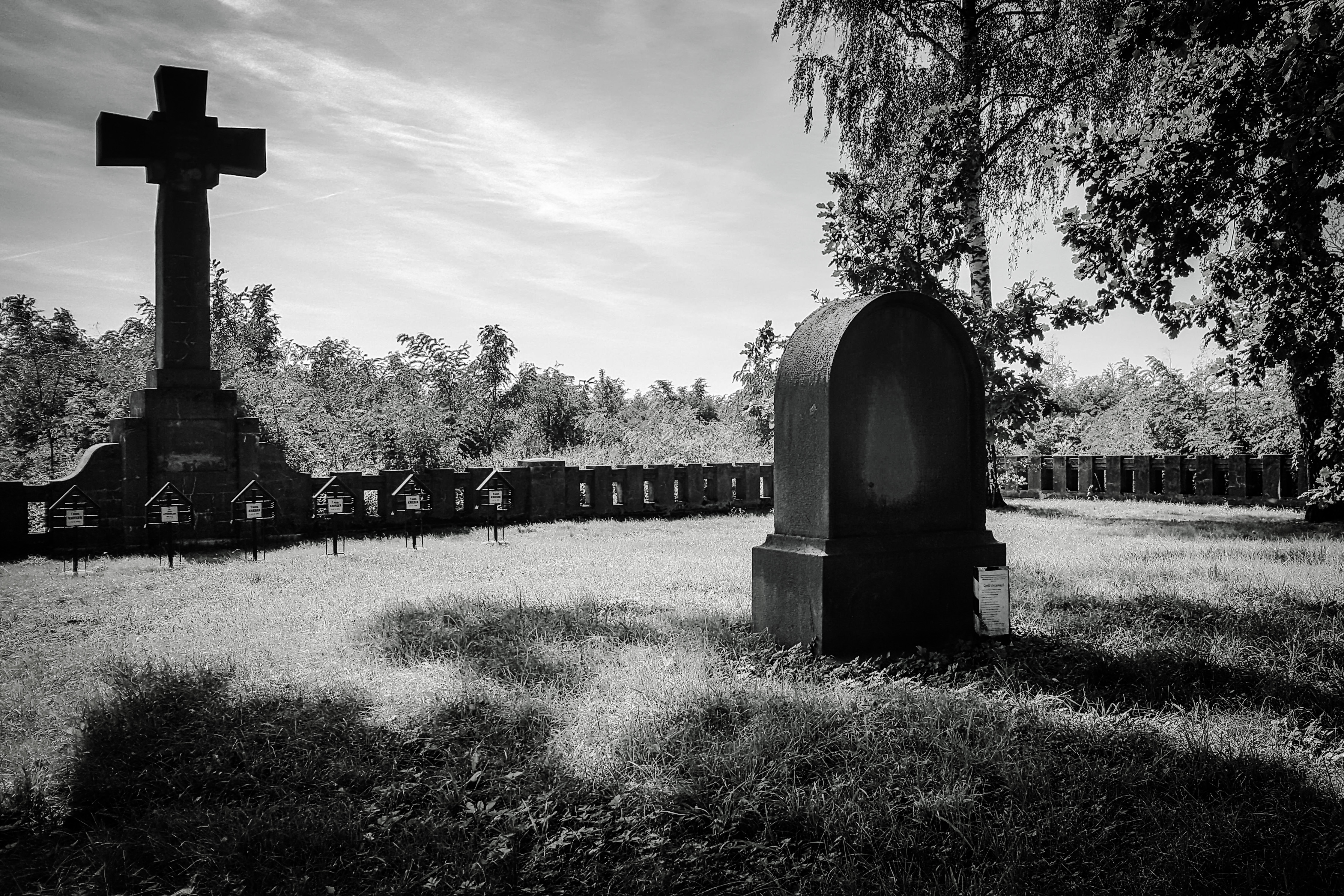 Cmentarz wojenny nr 208 z okresu I wojny światowej w Niedomicach. Stela na zbiorowej mogile żołnierzy rosyjskich i pomnik główny w formie monumentalnego krzyża